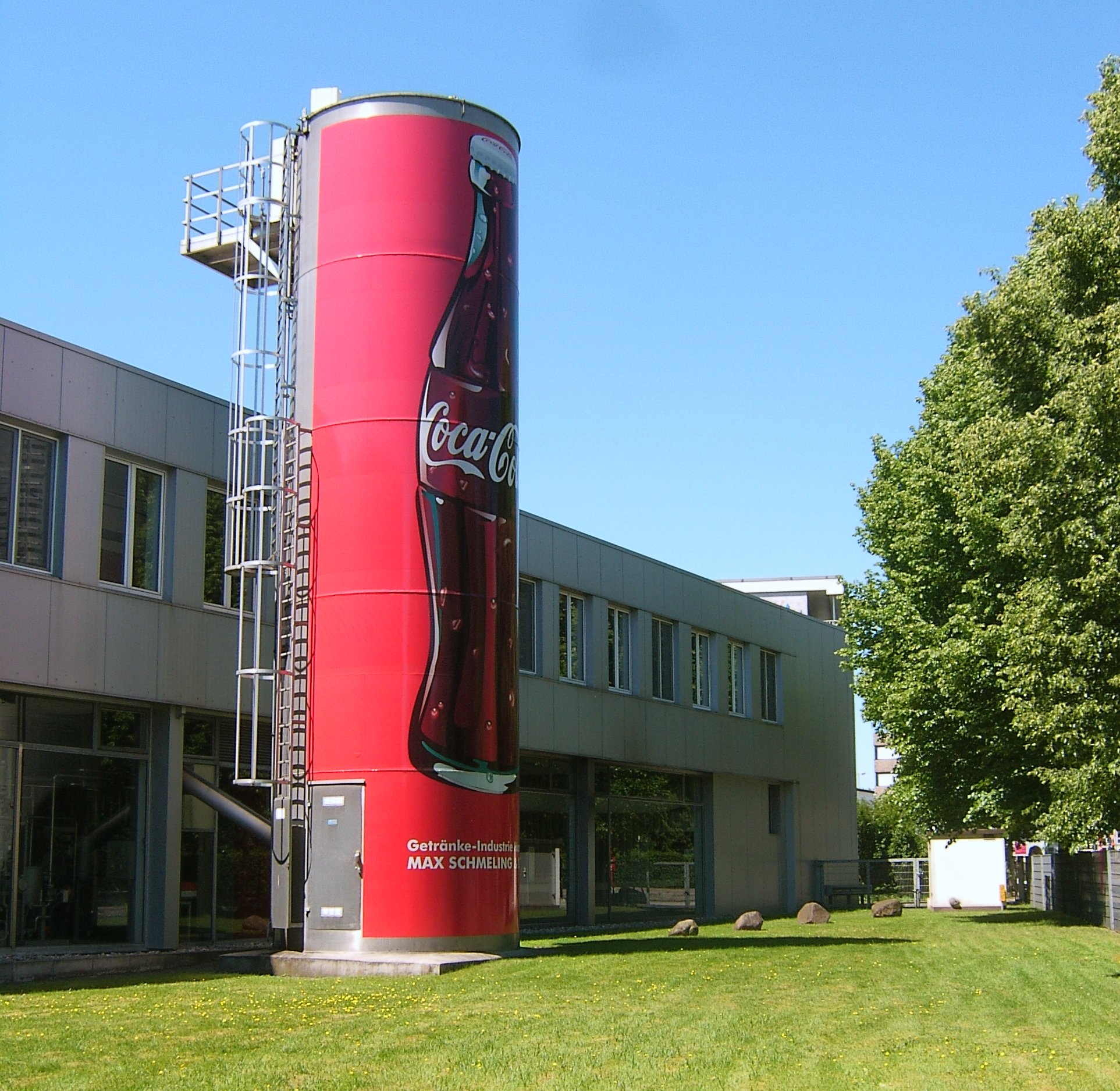 Hamburg-Bramfeld, Coca-Cola Abfüllwerk („Getränke-Industrie Hamburg Max Schmeling & Co. KG“)